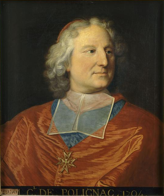 copie d'après un original de Rigaud conservé au musée du Louvre (MI 1102)